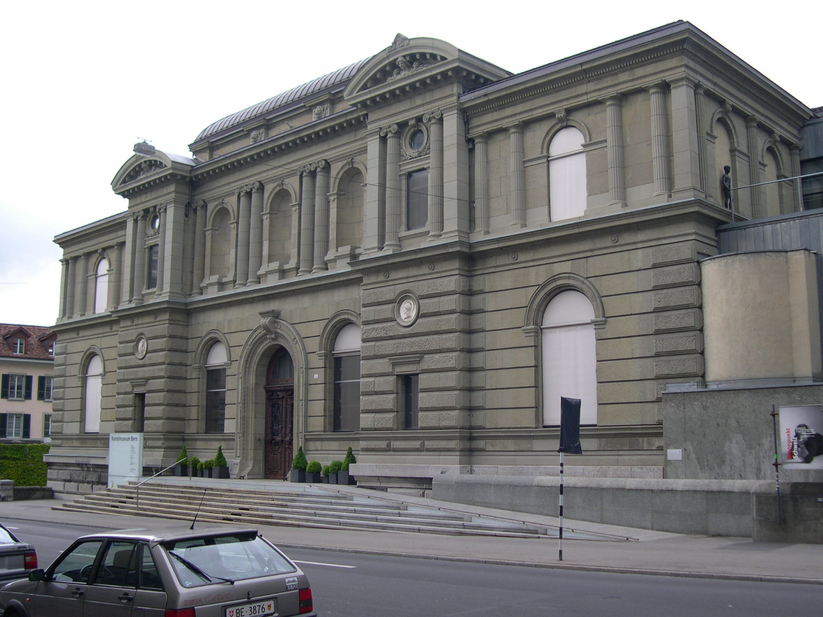 Kunstmuseum Bern mit leeren Nischen über Haupteingang während Restauration der Allegorien der Schönen Künste.